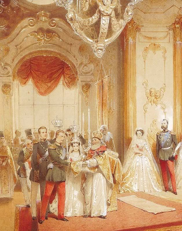 Зичи, Михай - Свадьба великого князя Александра Александровича и великой княгини Марии Федоровны